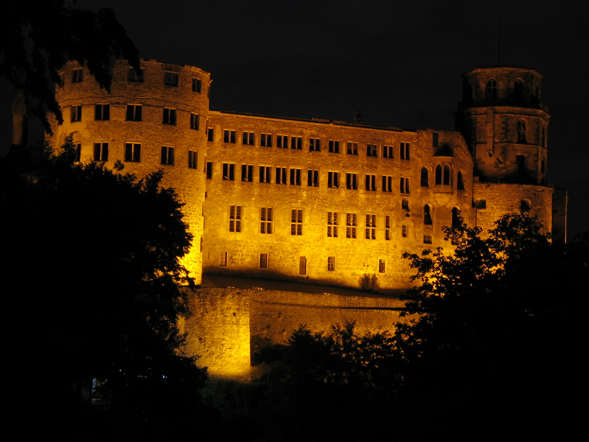 Heidelberger Schloss bei Nacht - Nr. 001 Heidelberg Castle at Night - No. 001